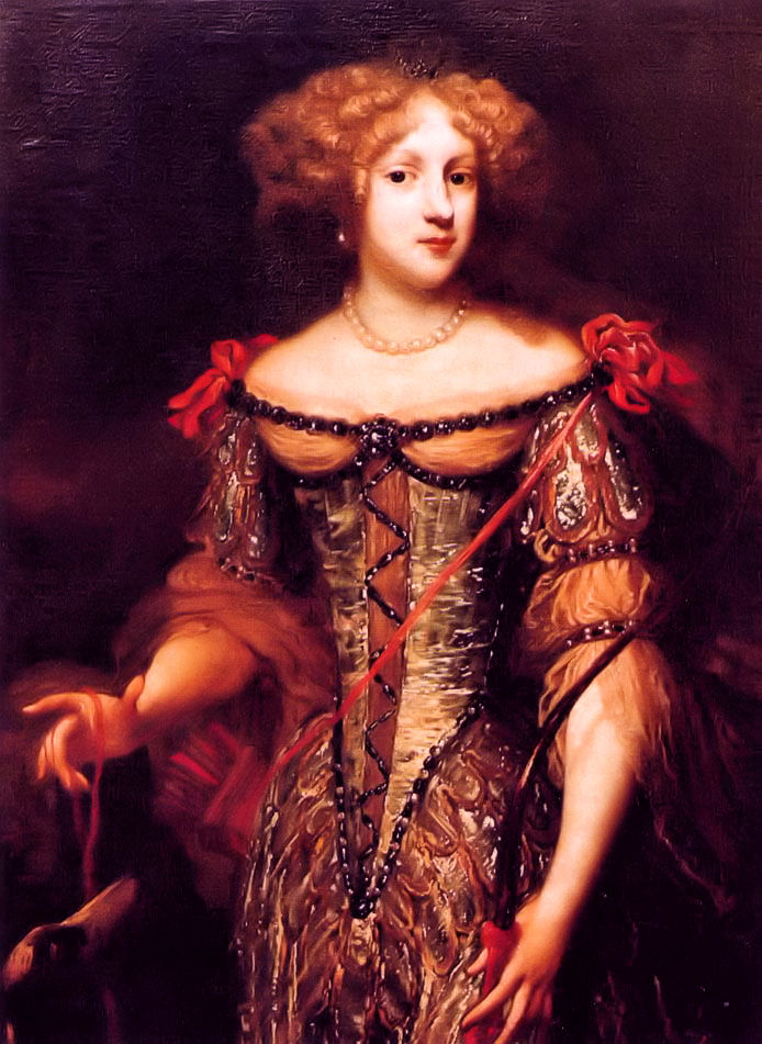 Lieselotte von der Pfalz